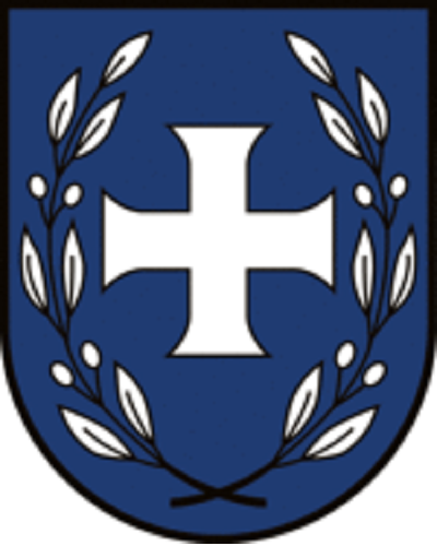 Das Wappen ist schildförmig mit blauem Untergrund, weißes Kreuz, gleichschenkelig in der Mitte, zwei Lorbeerzweige schließen das Kreuz unten (ebenfalls weiß). Die Bedeutung des Wappens ist eine Darstellung der Verbundenheit zum Lebensraum des Neusiedler Sees (blau) und der geistigen Grundlage des röm.-kath. Glaubens, dem Kreuz (Schicksalsgemeinschaft); die Lorbeerzweige stellen wohl die historische und geistige Brücke und die Glorifizierung dieser Symbole dar. Wappenspruch Das weiße Tatzenkreuz im Blau erinnert uns an Angst und Not, die Türkenkriege, Brand und Pest, an Raub, an Widerstand und Tod. Die Lorbeerzweige künden noch von Mannesmut und Tapferkeit und ihre Früchte sind der Lohn für Treue in bewegter Zeit. Der See, das Blau im Wappenschild, ist unsrer Hoffnung helles Licht, der Freiheit ungetrübter Glanz, der Glaube und die Zuversicht. Franz Theuer